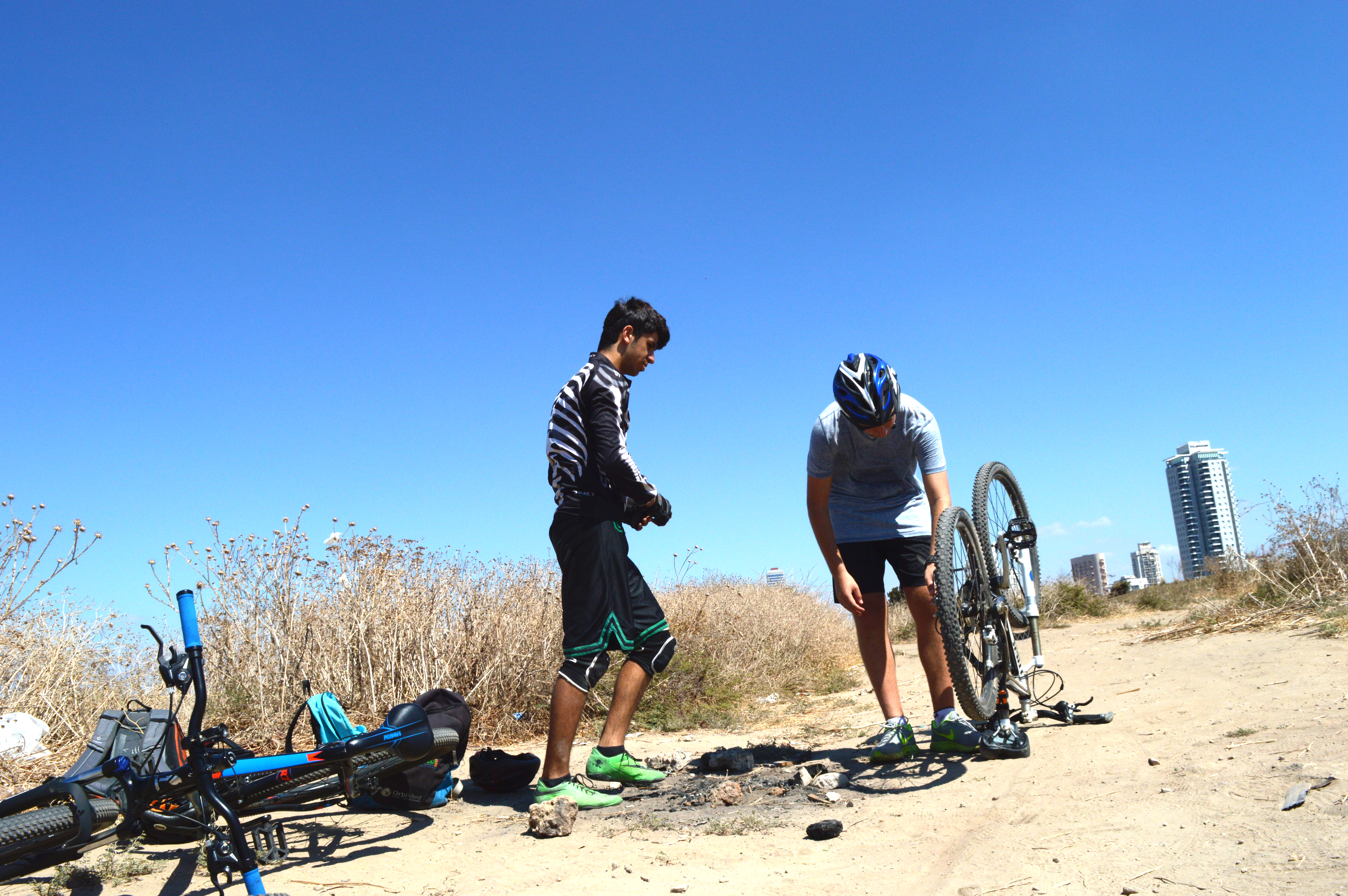 אופניי הרים גבעת נפוליאון